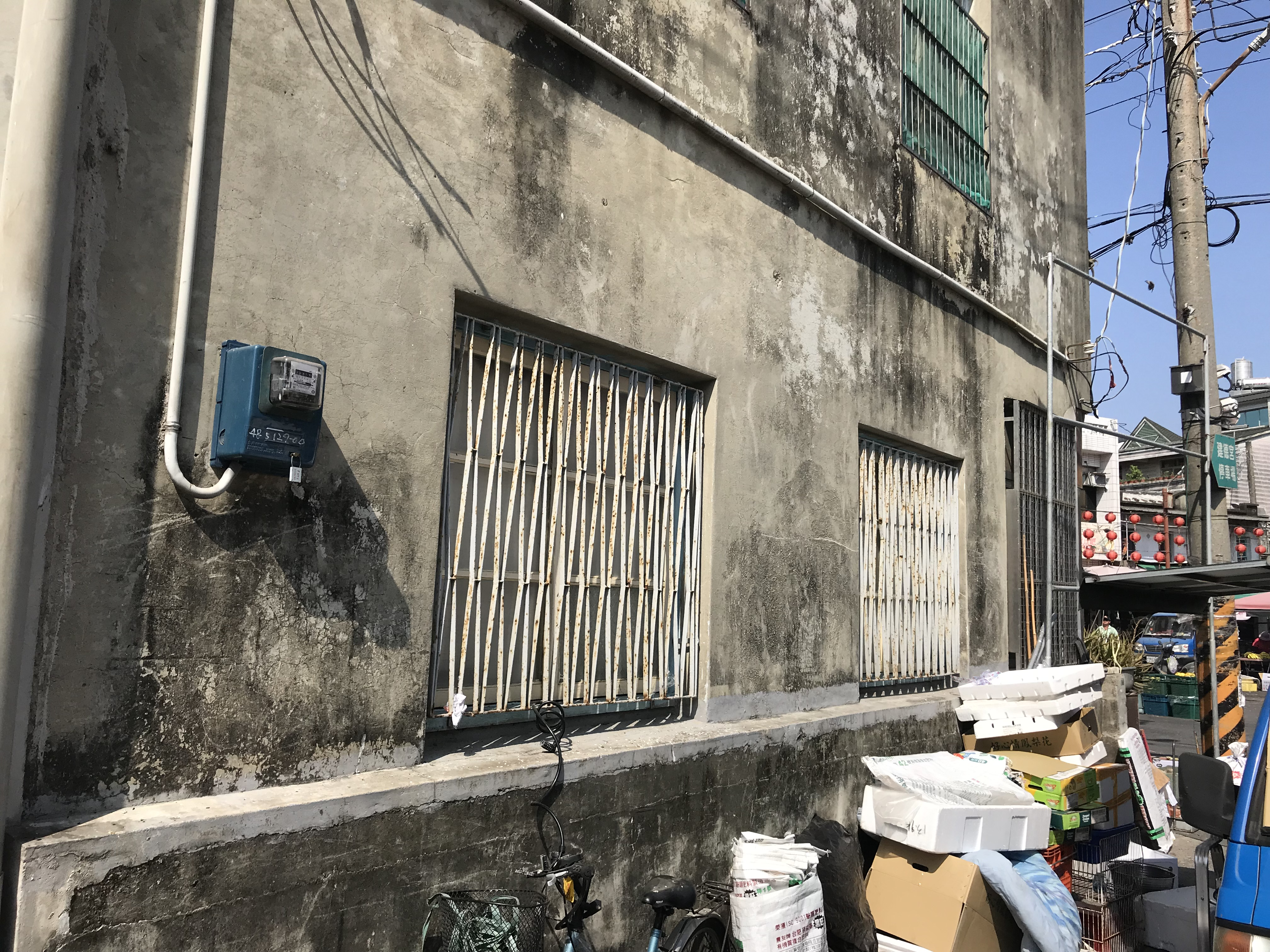 李志榮生前在過溝建德宮前擺攤處